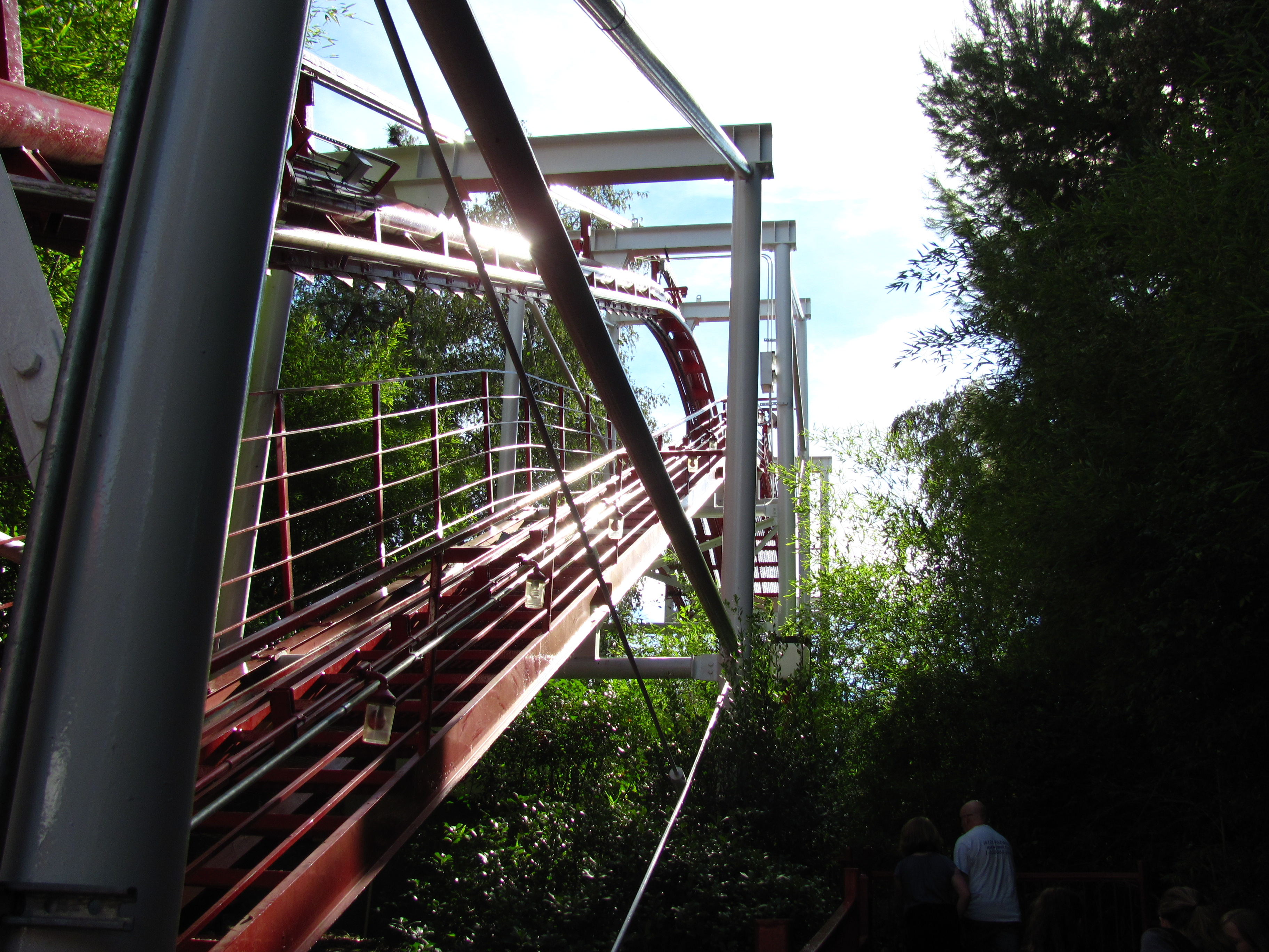 Ninja